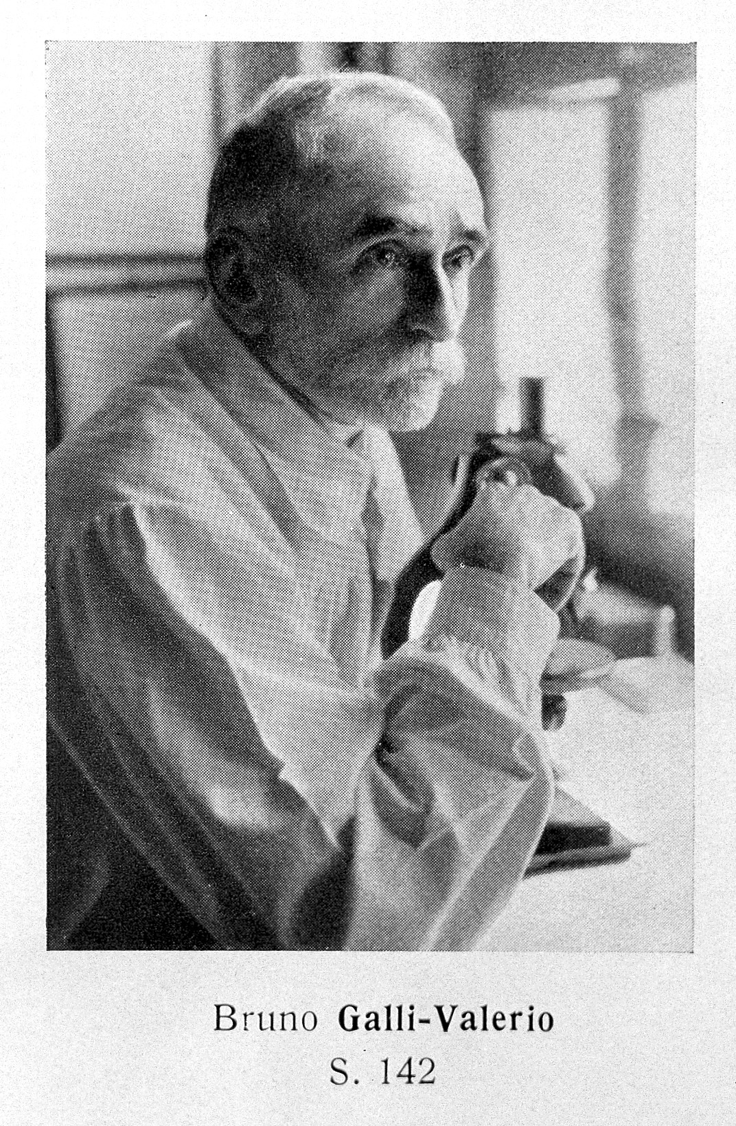 Bruno Galli-Valerio General Collections Keywords: Bruno Galli-Valerio